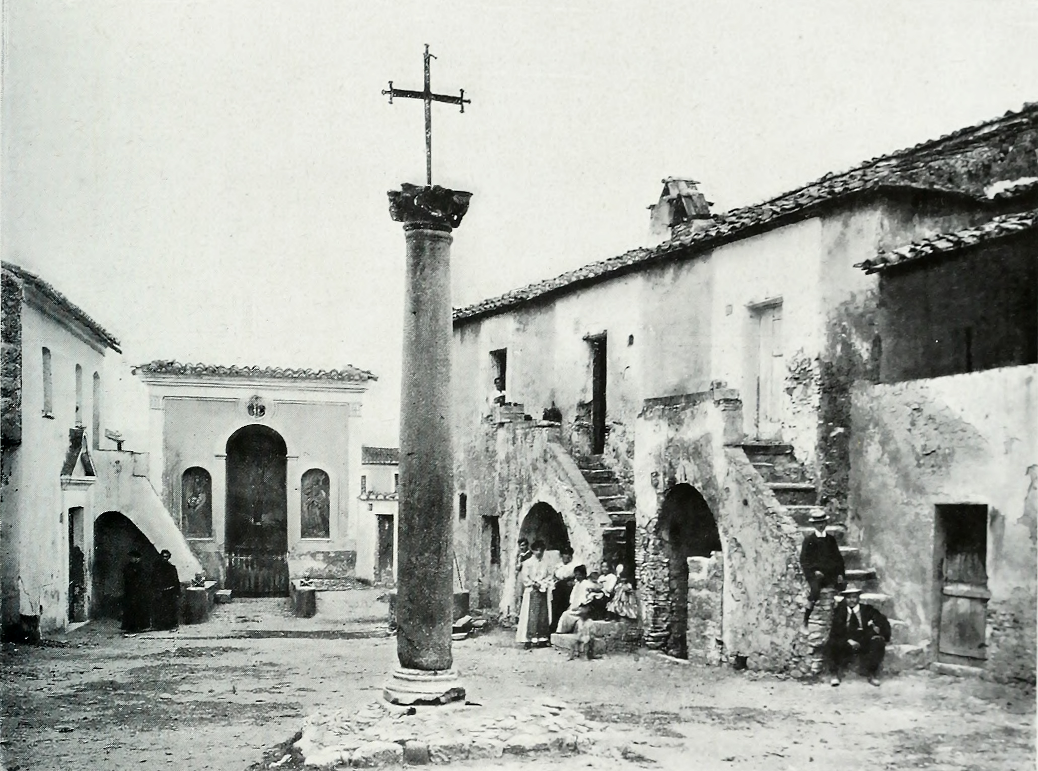 Il largo dei Morticelli a Benevento, con la colonna di granito all'ingresso, in una fotografia di inizio XX secolo e quindi antecedente alla distruzione dell'area causata dagli eventi della seconda guerra mondiale. L'ingresso al cimitero dei Morticelli è l'edificio sulla sinistra